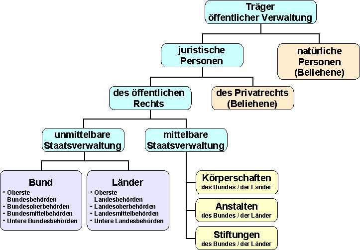 Schaubild 2 zu Verwaltungsträger Autor: C.Löser Erstellt mit: de: Draw Siehe auch: Bild:Verwaltung und Legitimation.png